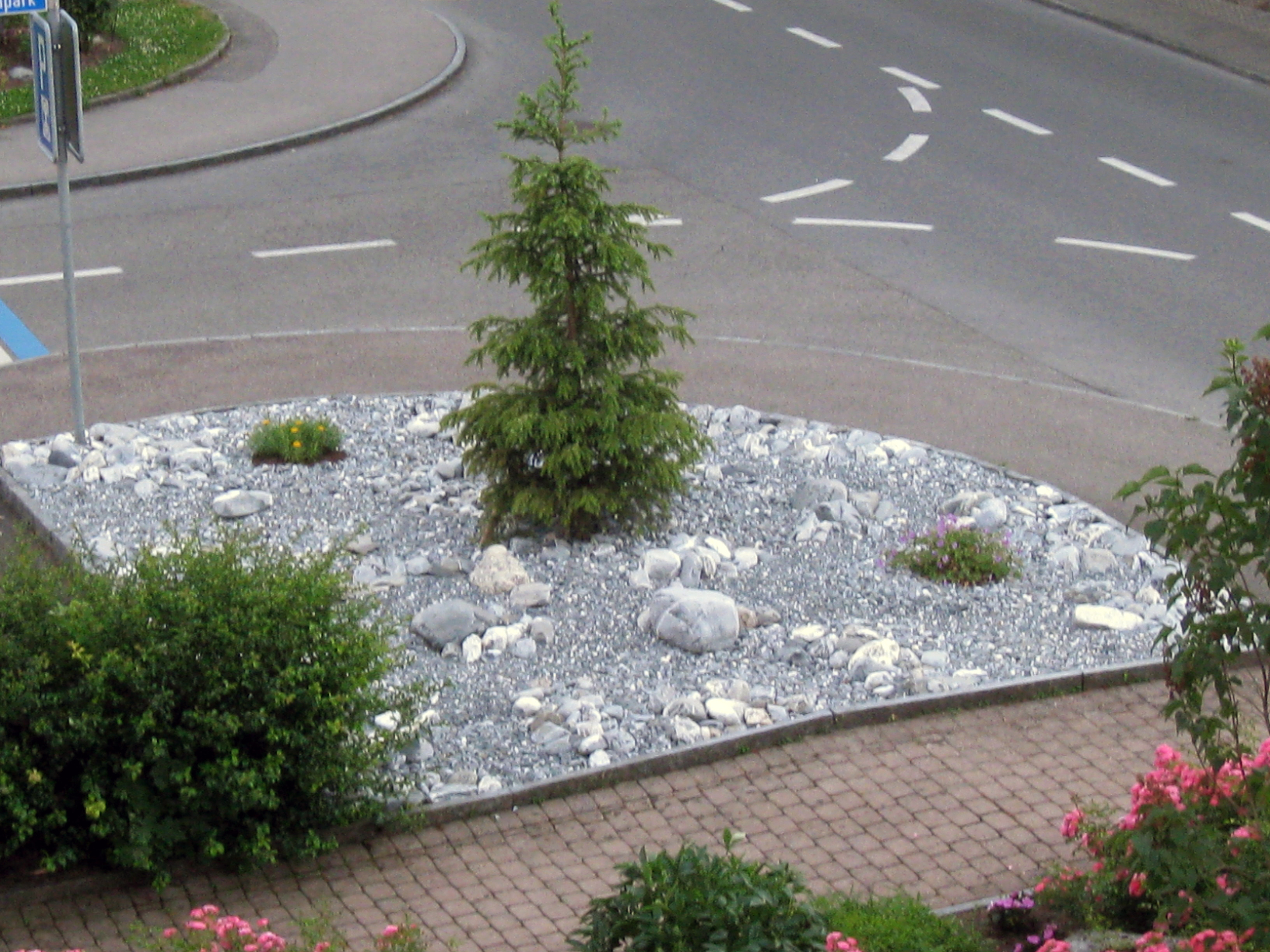 Steingarten